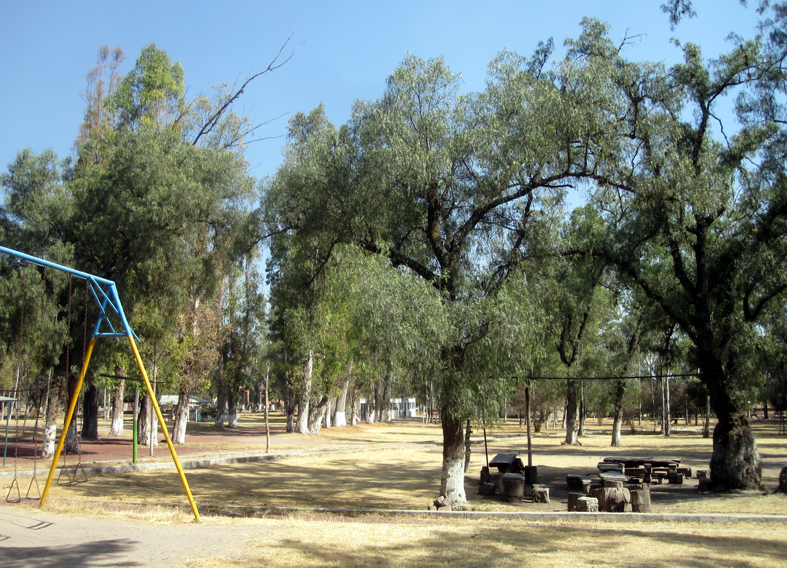 Parken Los Ahuehuetes i Atenco i Mexico